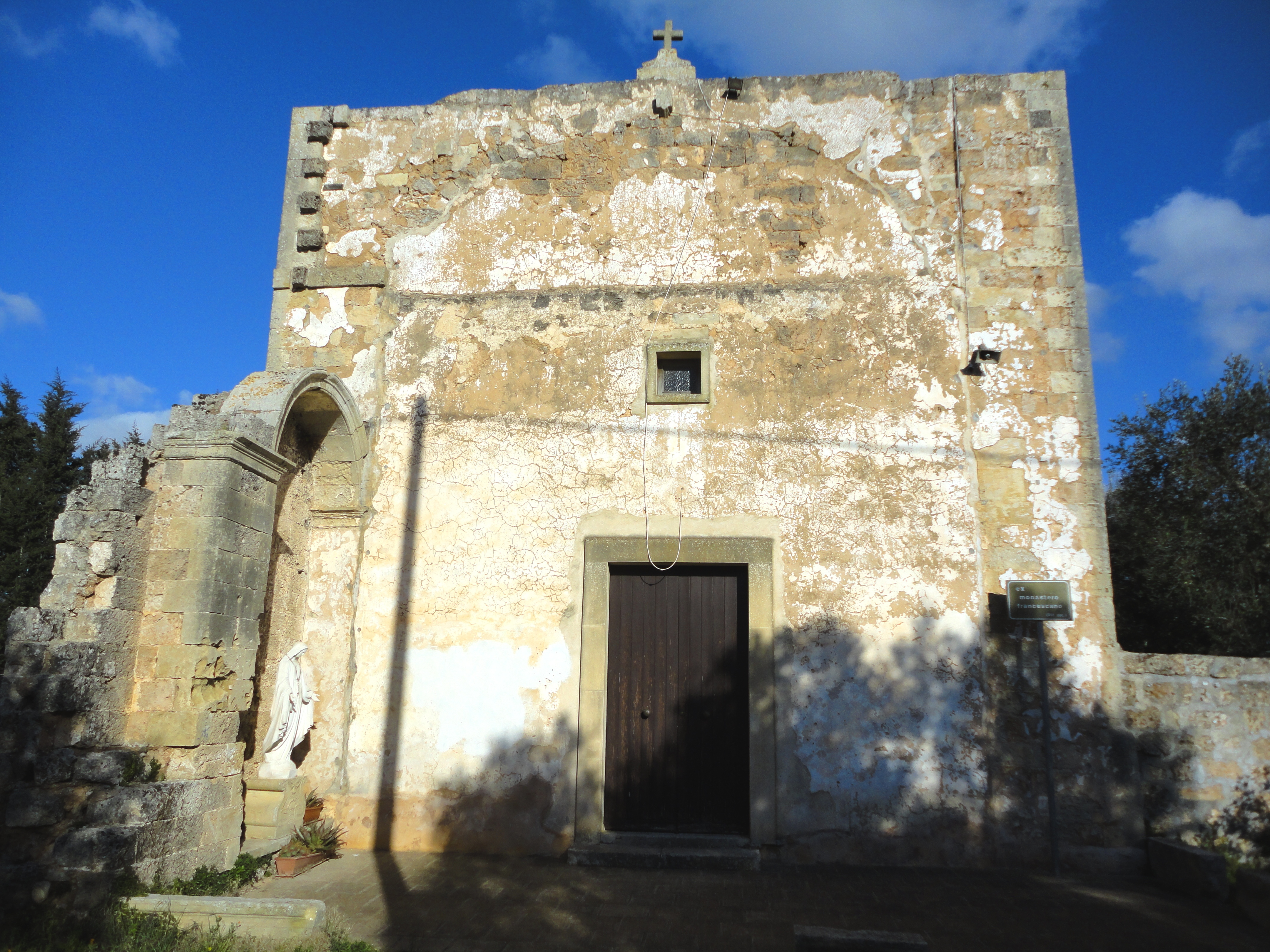 Chiesa Santa Maria degli Angeli Sternatia, Lecce